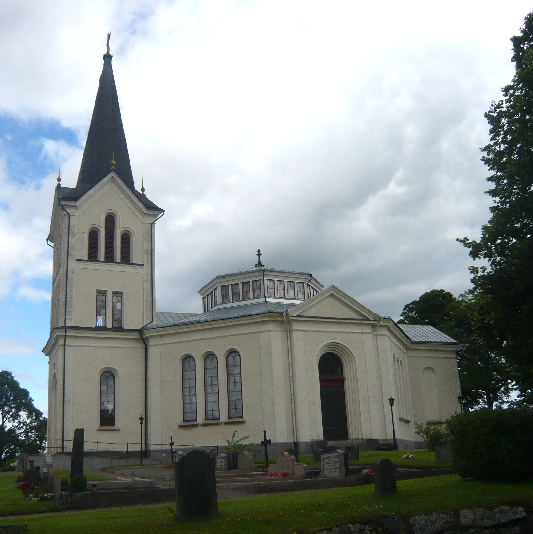 Öggestorps kyrka